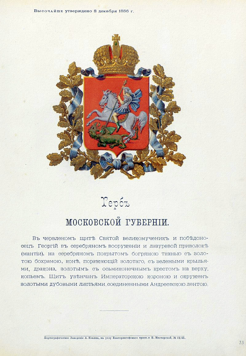 Official Russian Empire coat of arms Moskva Governorate. Герб Российской Империи Московской губернии с официальным описанием в Гербовнике Бенке. Утверждён Императором Всероссийским Александром Вторым в 1878 году.